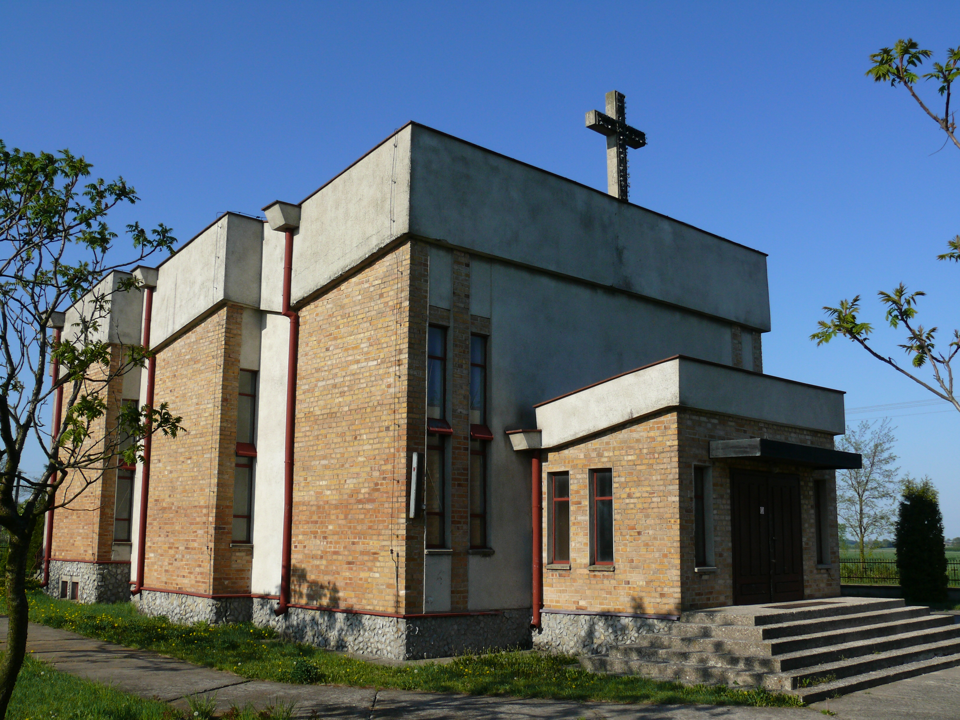 Kościół filialny parafii św.Jakuba we Wrzący Wielkiej w Kiełczewie Smużnym Pierwszym